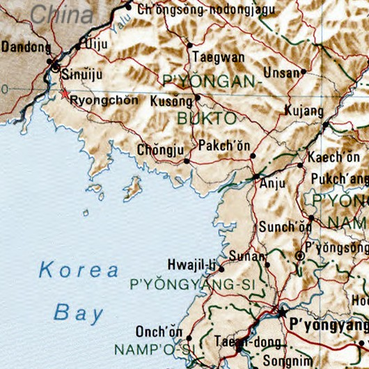 Karte Zugunglück von Ryongchŏn Anmerkung: Ausschnitt aus Image:North Korea 1996 CIA map.jpg, Stern und Texte China und Ryongchŏn eingefügt